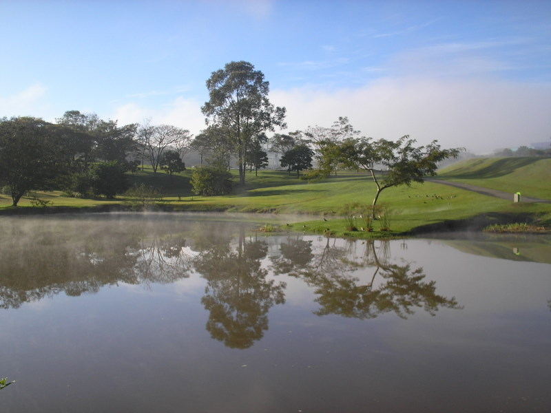 Um dos lagos do Jardim Botânico de Curitiba, PR, sul do Brasil.